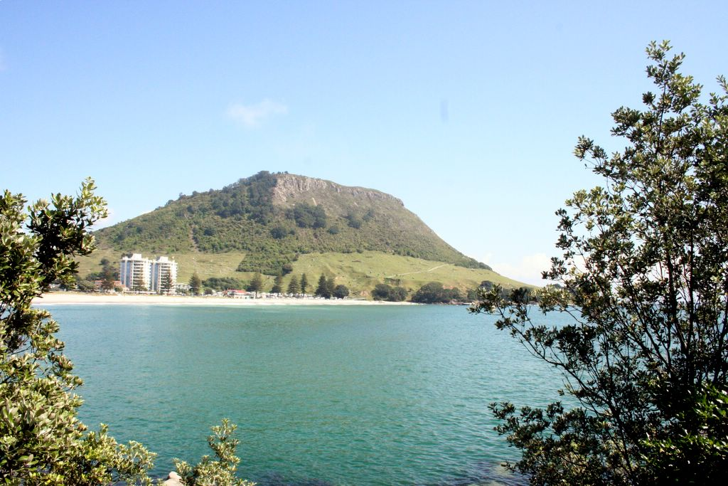 Mount Manganui scenaryMount Manganui scenary